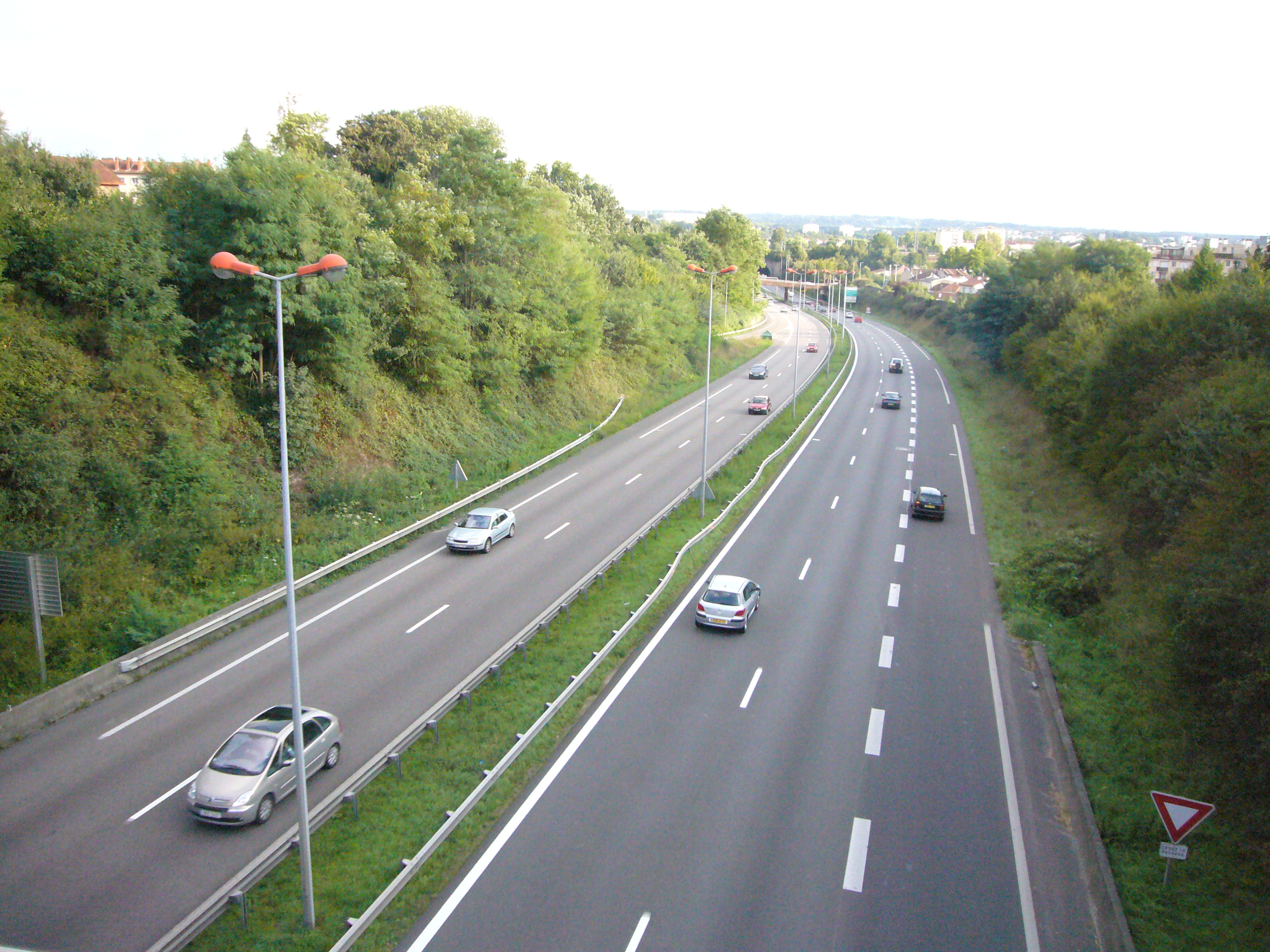 L'autoroute A20 à Limoges, vue depuis le pont ferroviaire de la voie Limoges-Angoulême